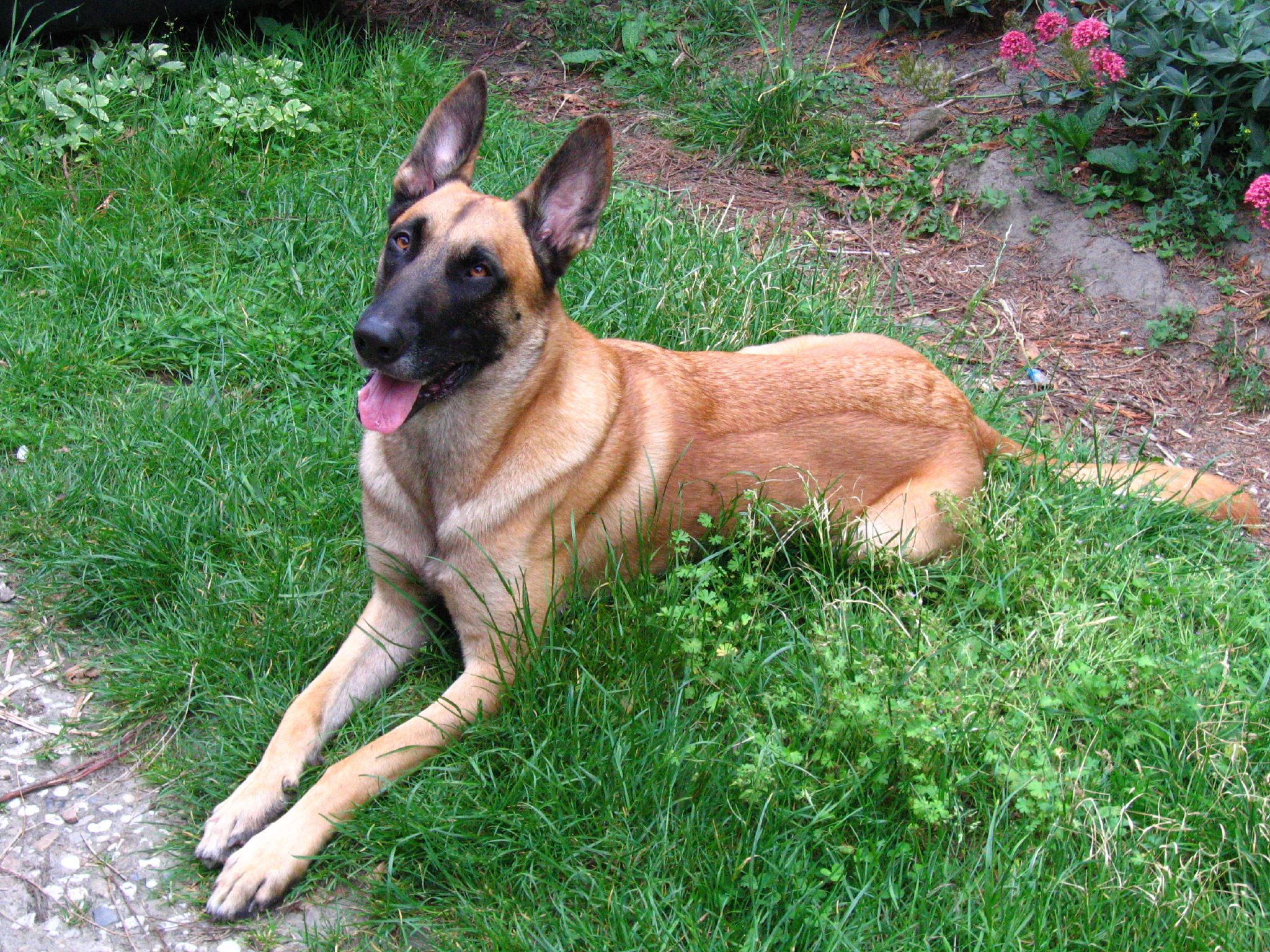 A male Belgian Malinois.Mo